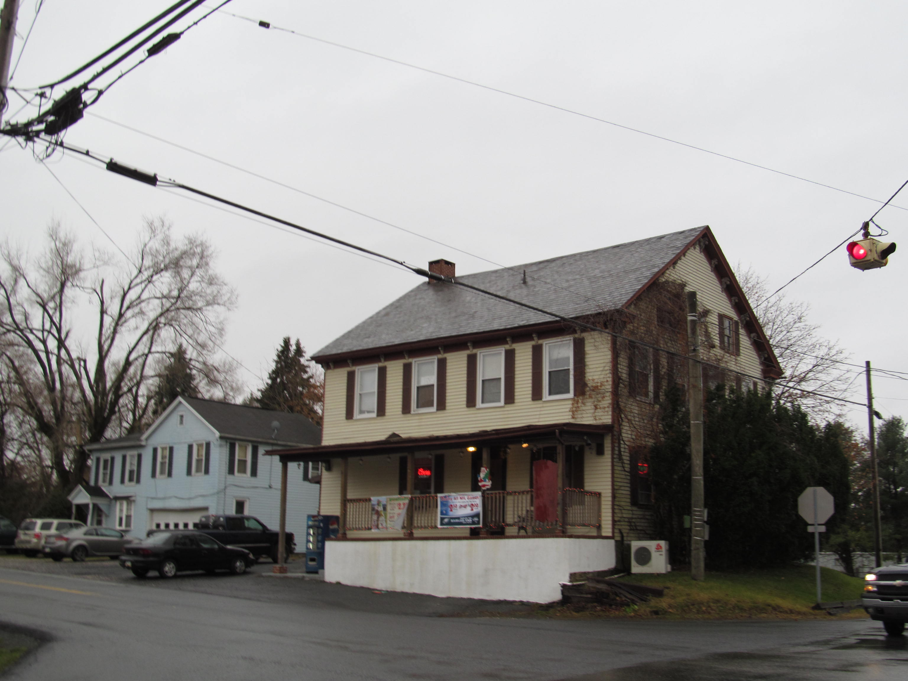 Krumsville, Pennsylvania